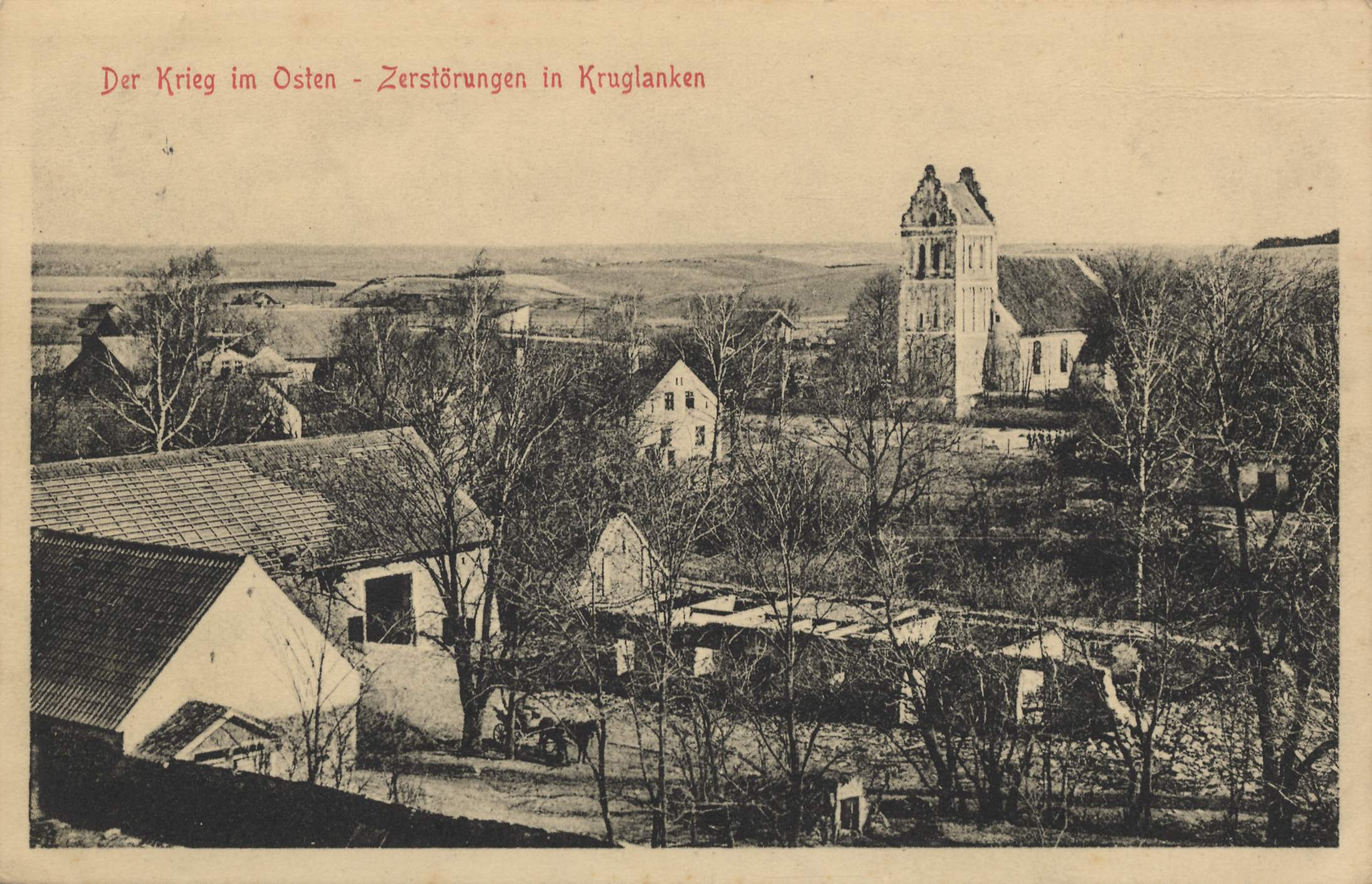 Stadtansicht